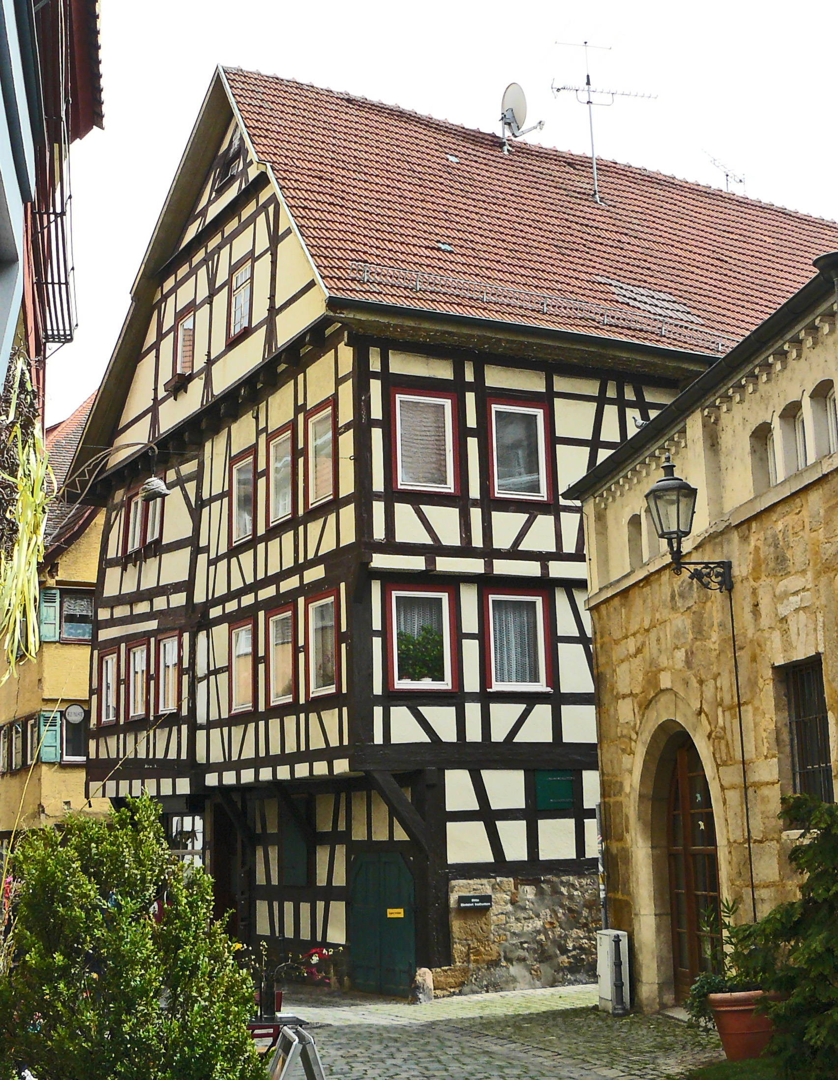 Esslingen am Neckar, Webergasse 8